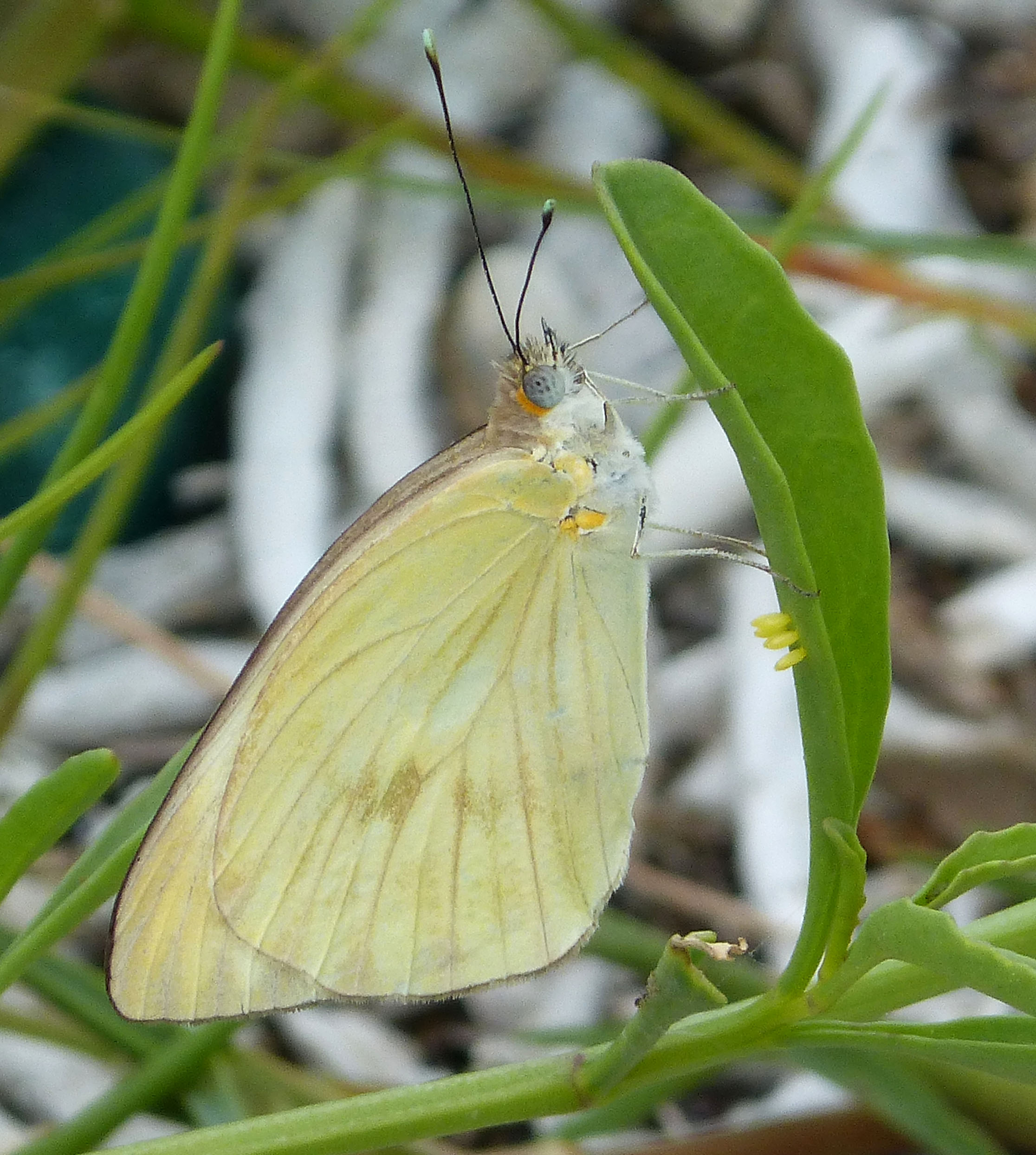 Cayo Coco, Cuba